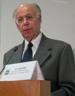 El Dr. José Narro robles, director de la Facultad de Medicina de la UNAM.